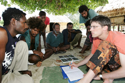 Yu Savé Lapérus? « Que sont devenus les marins rescapés ? » Alexandre François, enquête de terrain à Vanikoro.